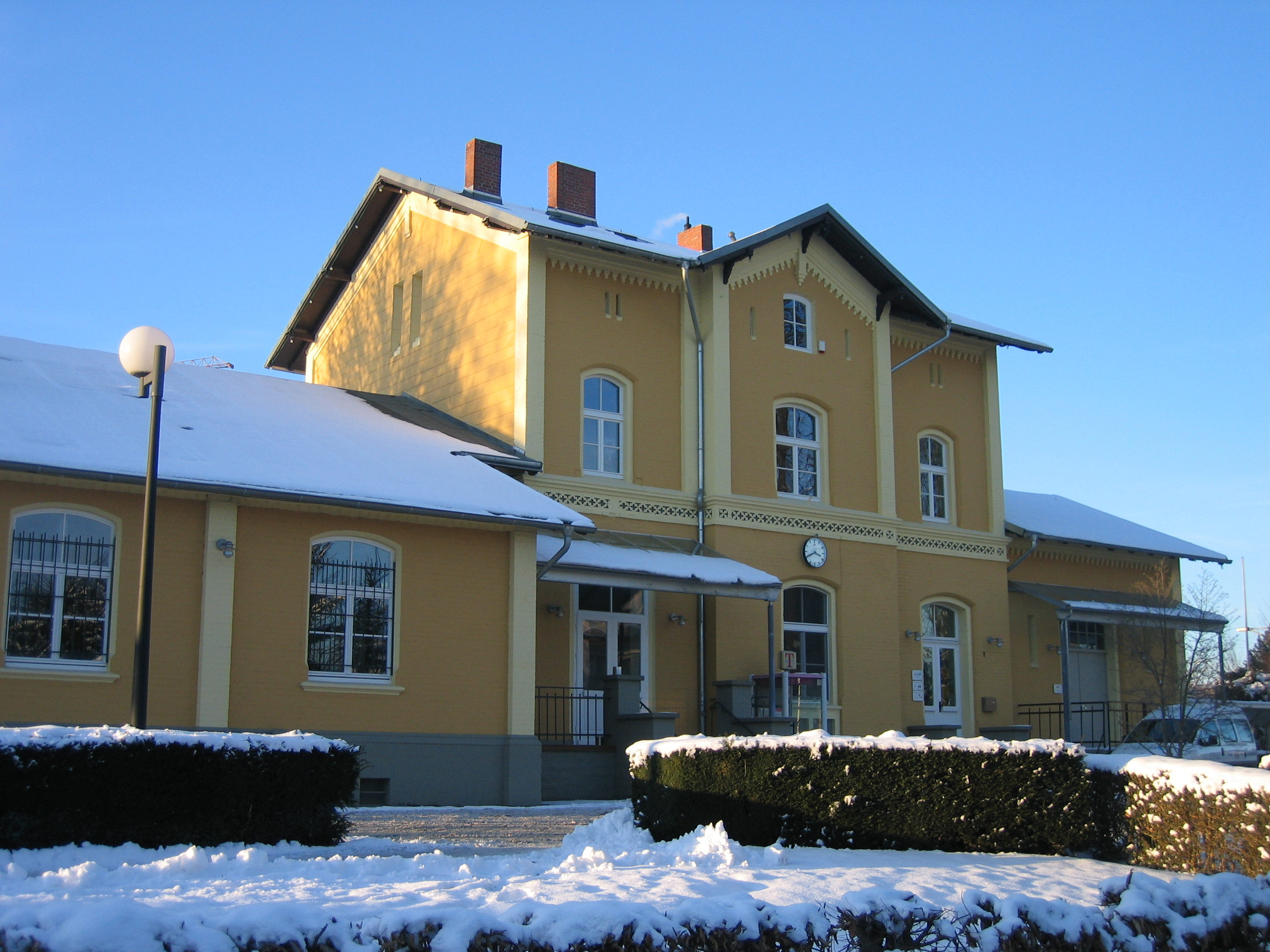 Bahnhof Bad Sassendorf mit ehemaligem Empfangsgebäude